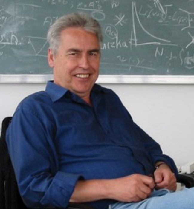 Prof. a.D. Jochem Fleischer, Univ. Bielefeld, Physik